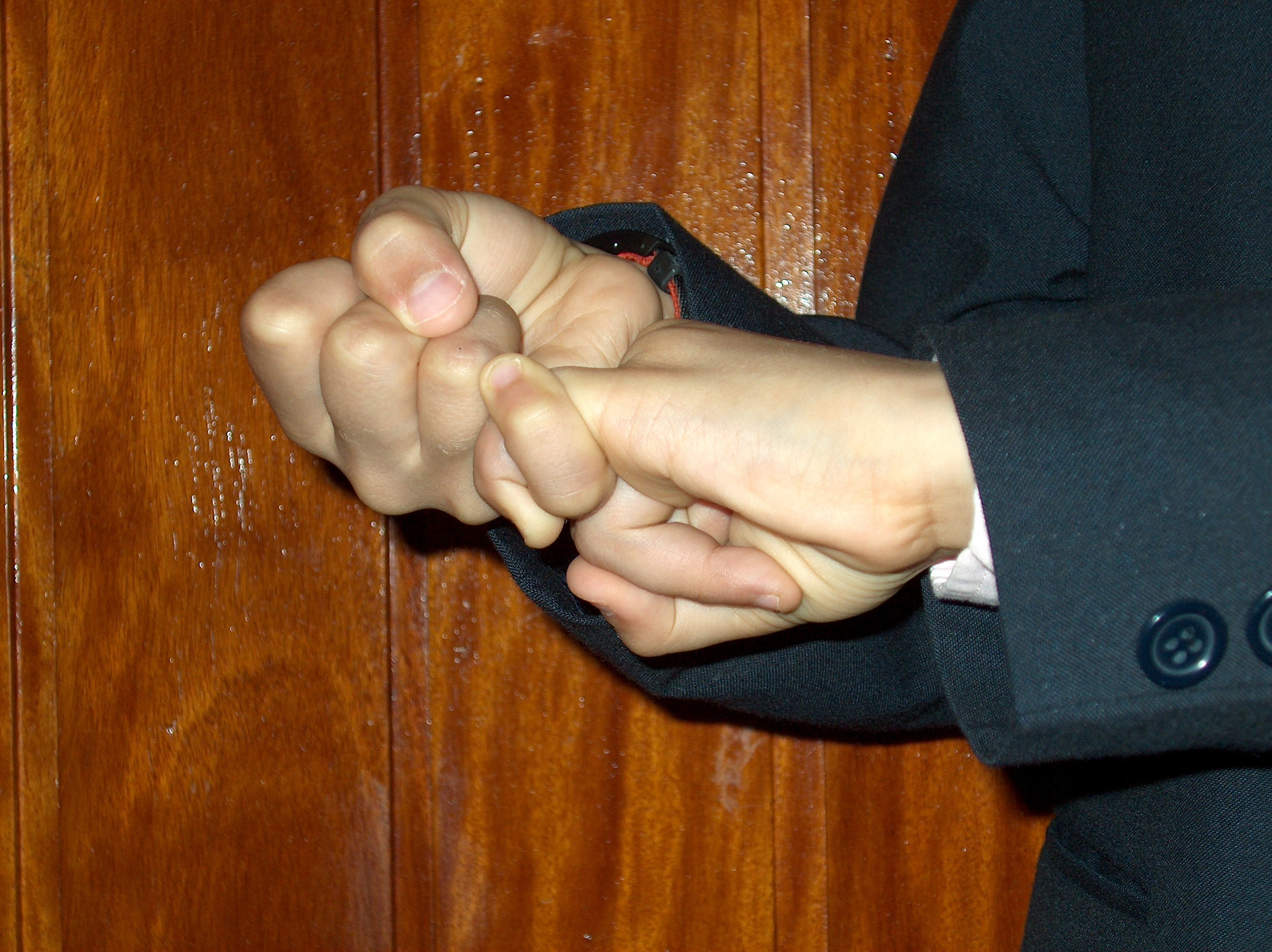 Criança falando em língua gestual